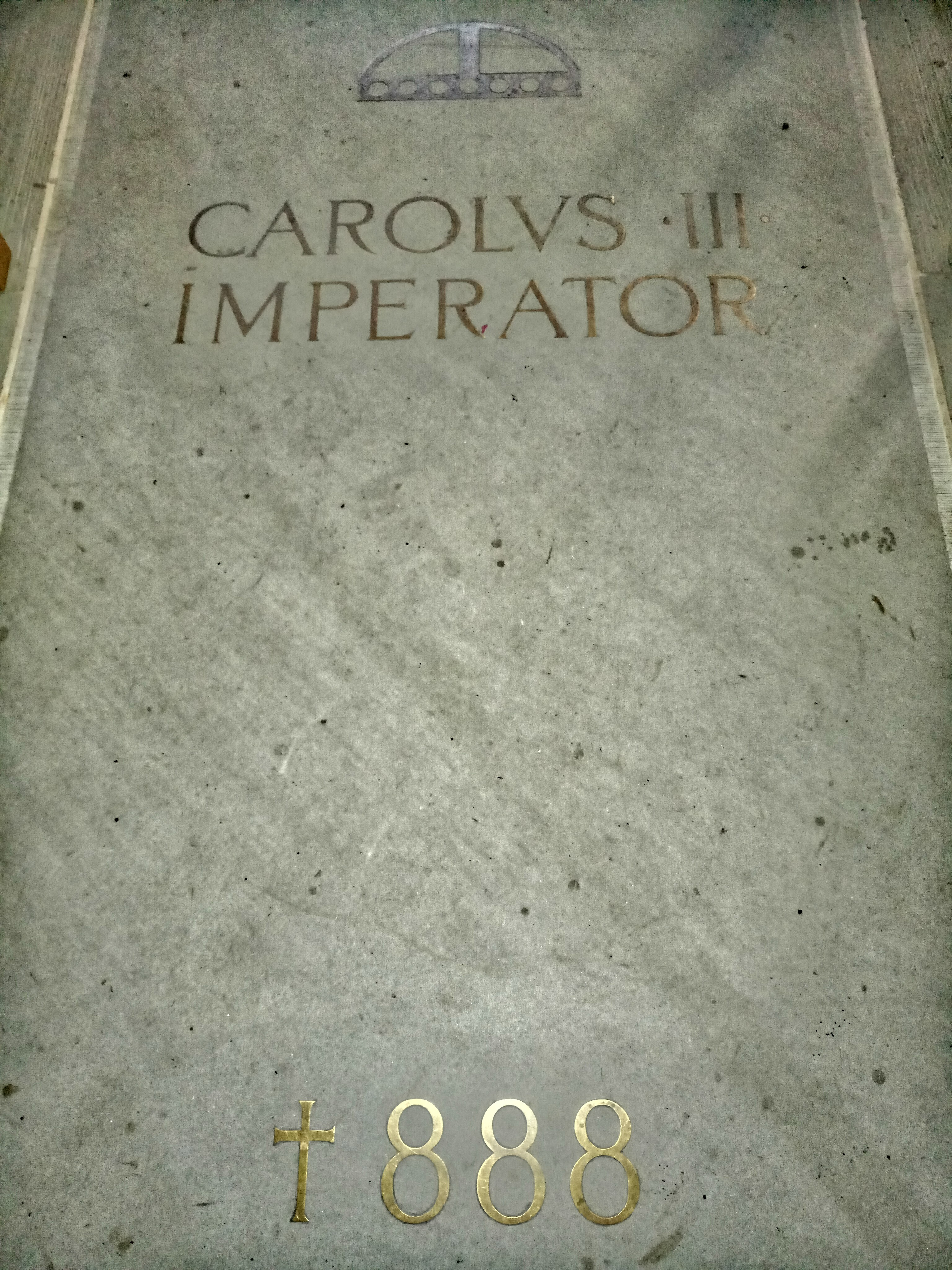 Reichenau, Münster Mittelzell, Grab Karl III.